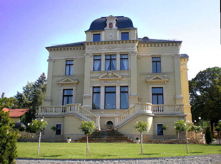 Villa Eichenberg, Goethestraße 1, Gera, Thüringen